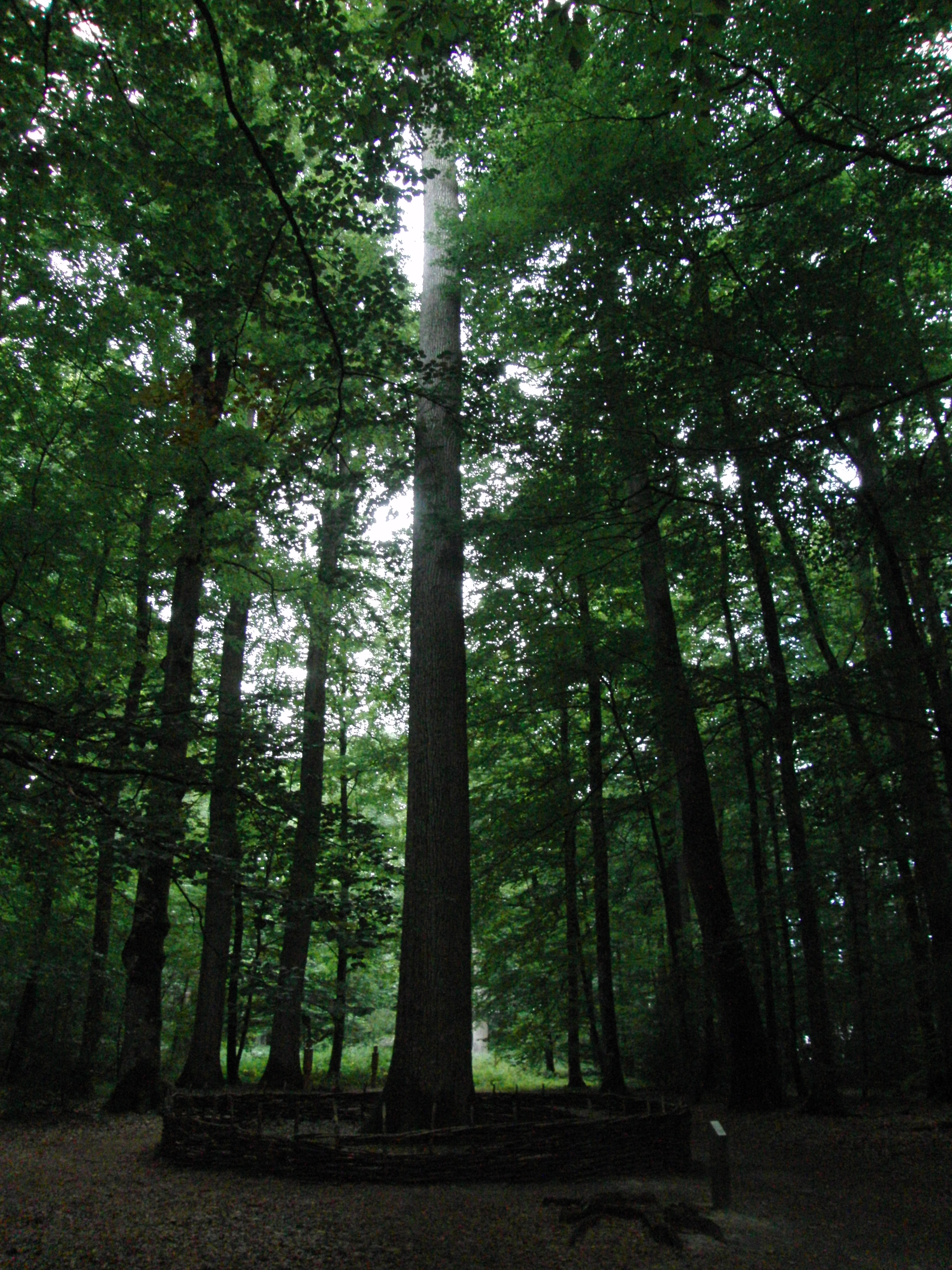 Chêne Rouleau de la Roussière, forêt de Bercé, Sarthe, France